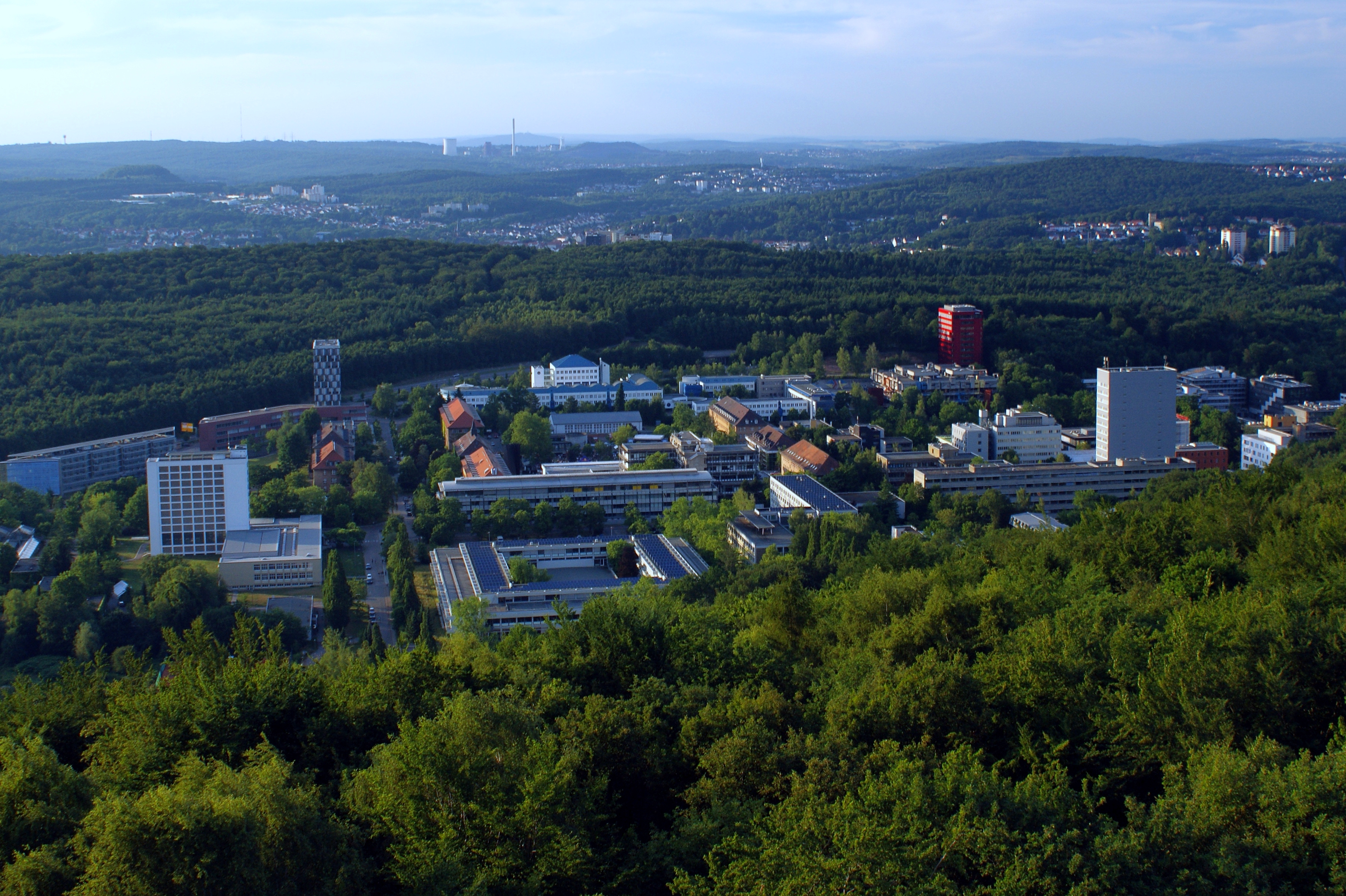 vom Schwarzenbergturm aus fotographiert